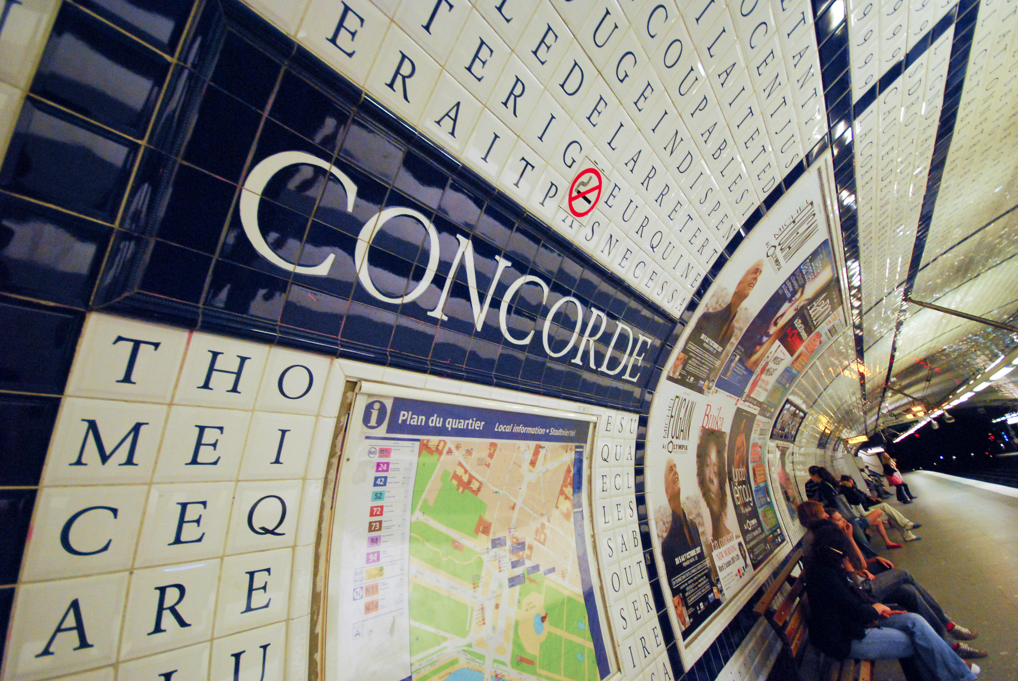 Concorde (Paris Metro line 12)